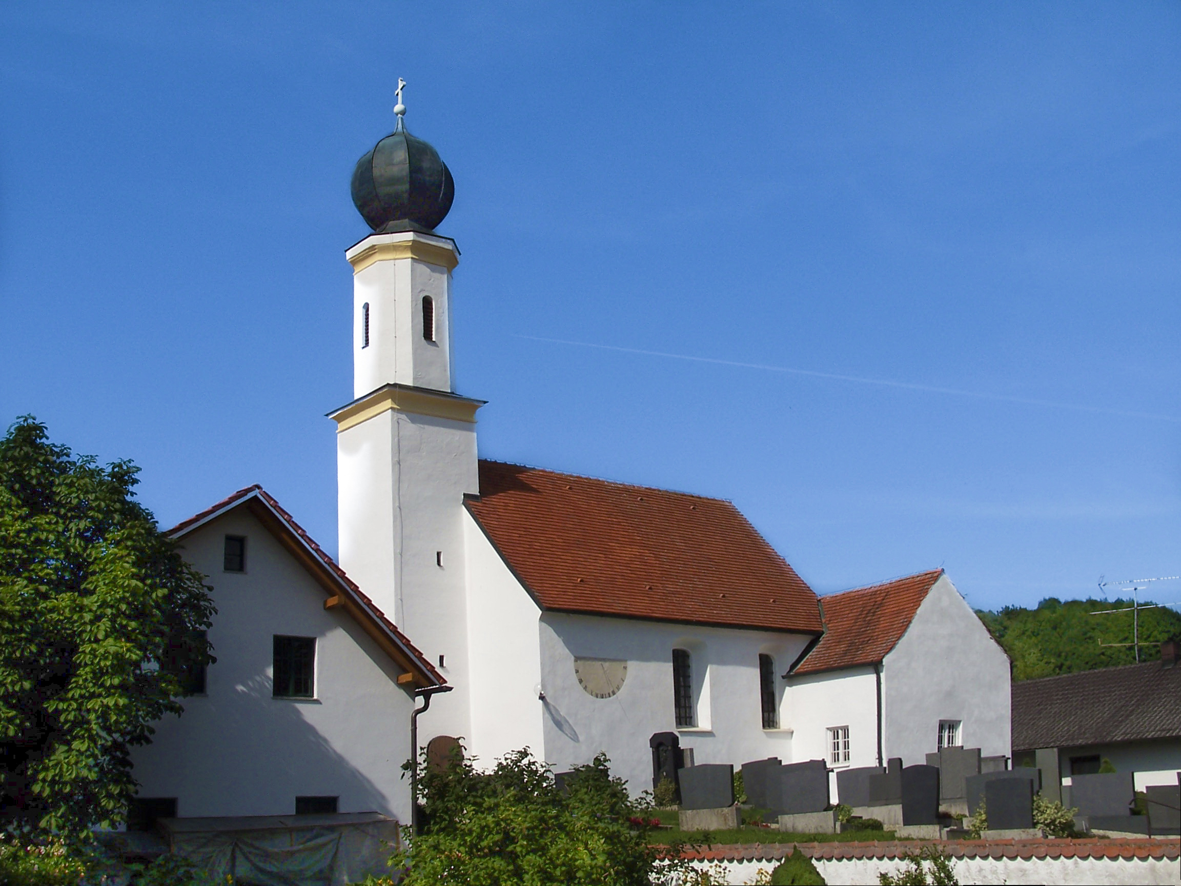 Hohenthann, Petersglaim. Kirche St. Peter. Romanischer Bau wohl des 12./13. Jahrhundert, 1691 von Georg Pohner barockisiert, Turm 1736 von Franz Pichlmayer; mit Ausstattung.